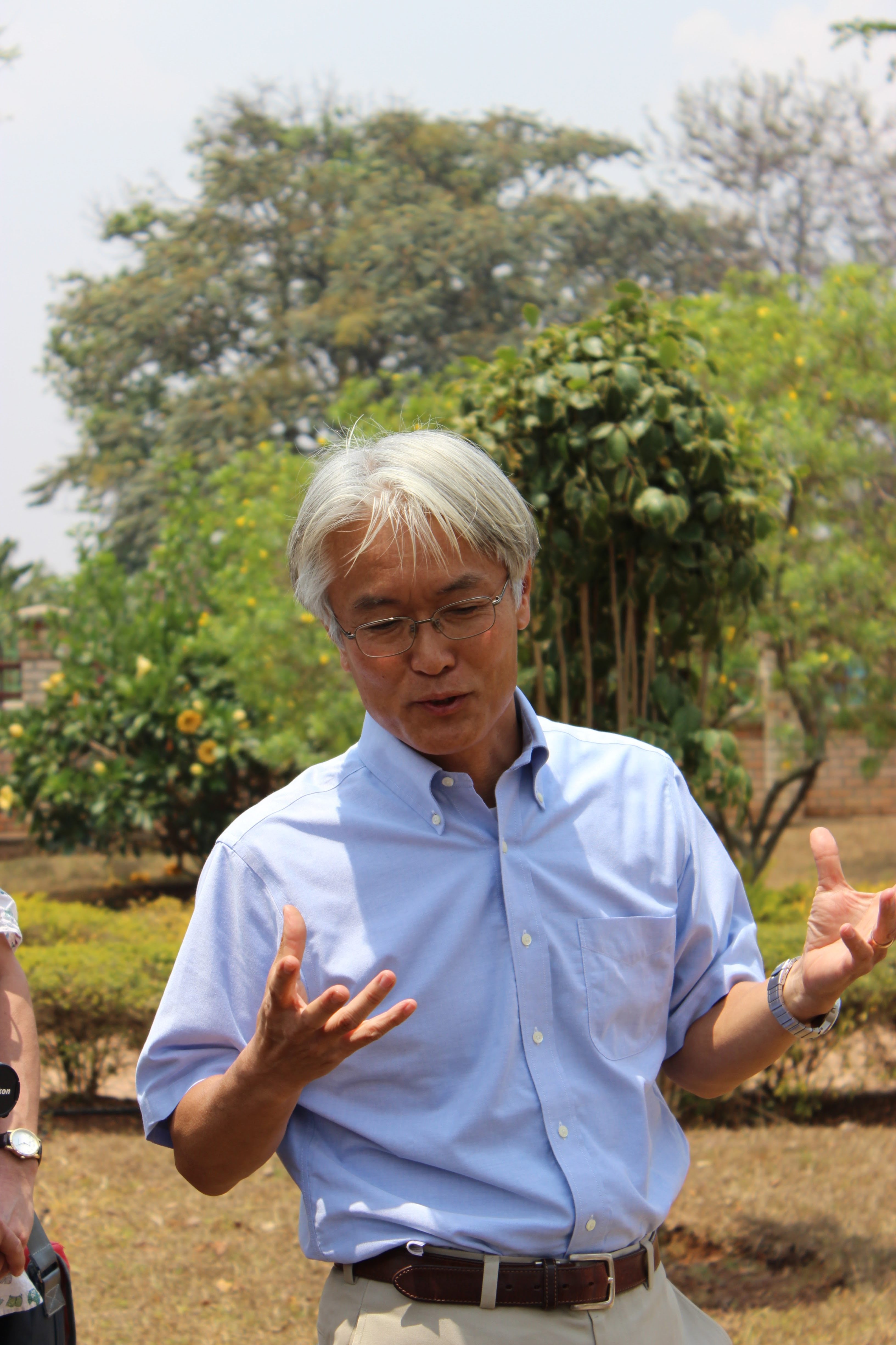 佐々木和之（ささきかずゆき）